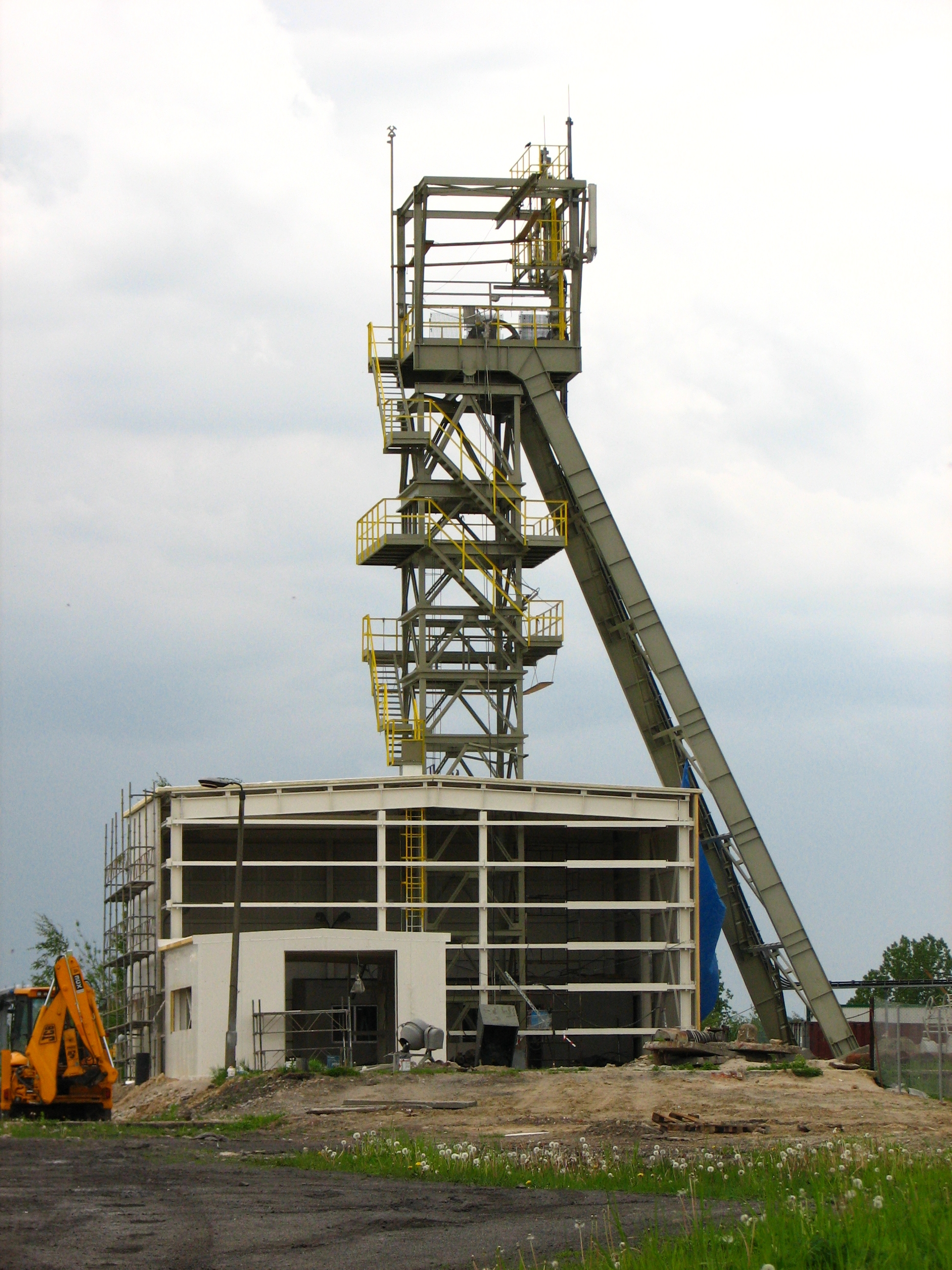 Wieża wyciągowa szybu Kościuszko kopalni soli Wieliczka w Wieliczce, ul. Tadeusza Kościuszki 2.